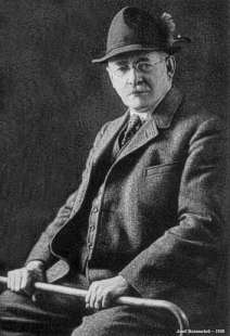 Josef Matouschek (1867 - 1945)